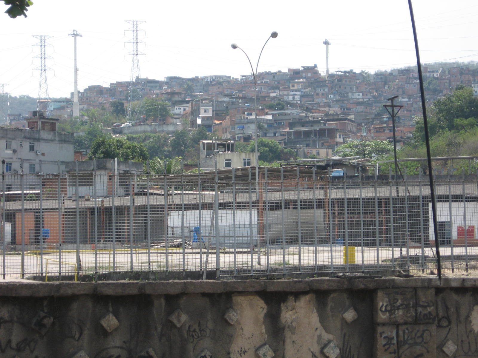 Vista do Complexo do Alemão.